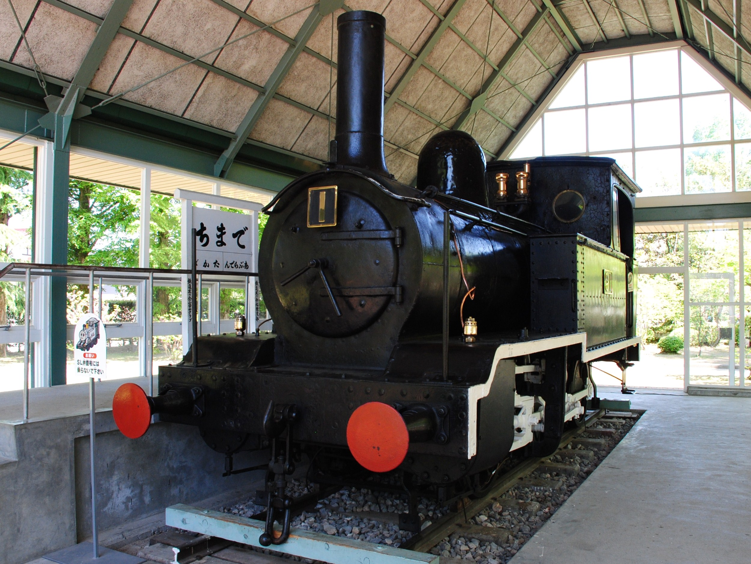 砺波チューリップ公園内で保存されている蒸気機関車「中越弁慶号」